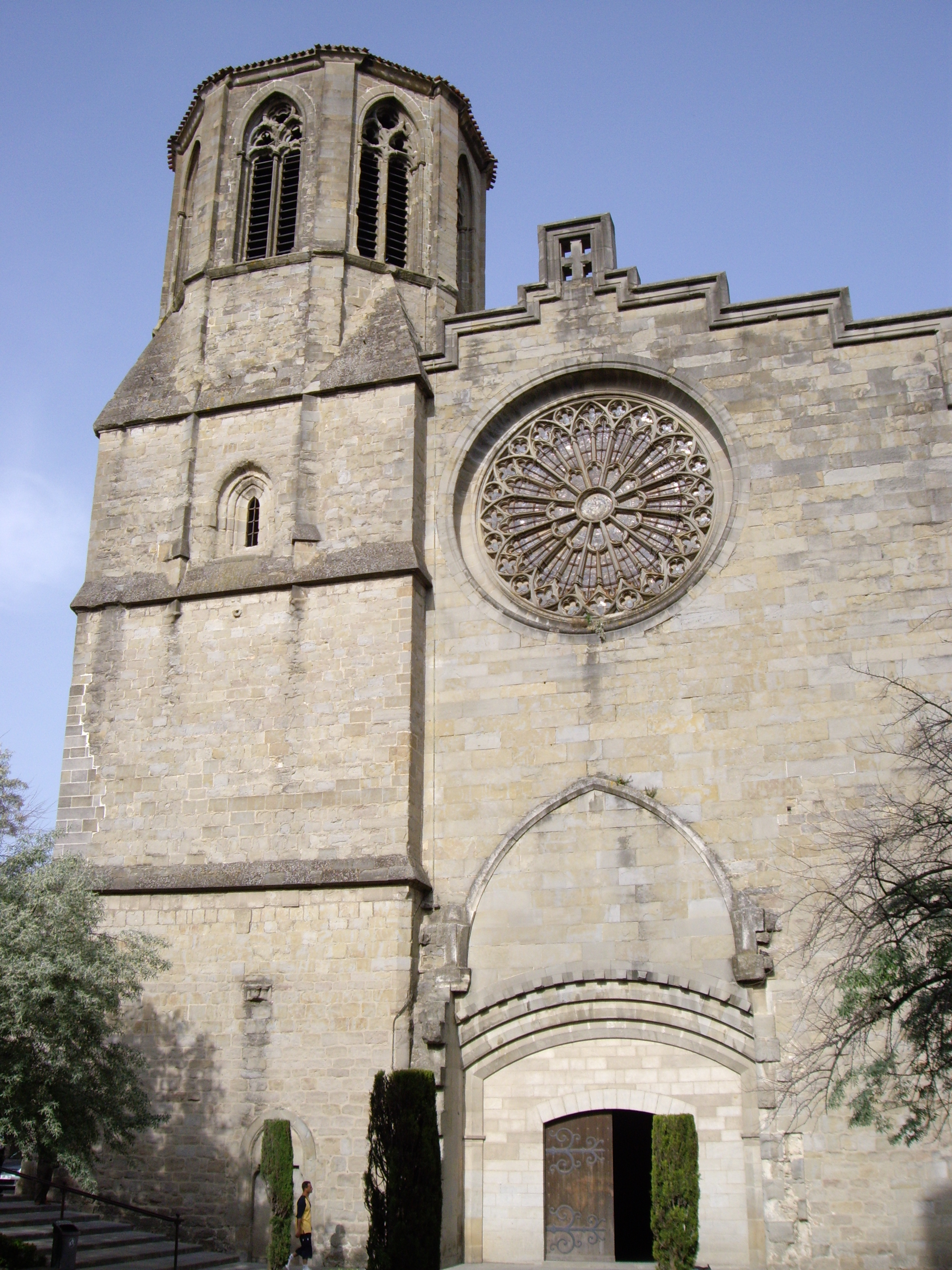 Cathédrale Saint-Michel de Carcassonne (Aude - 11)